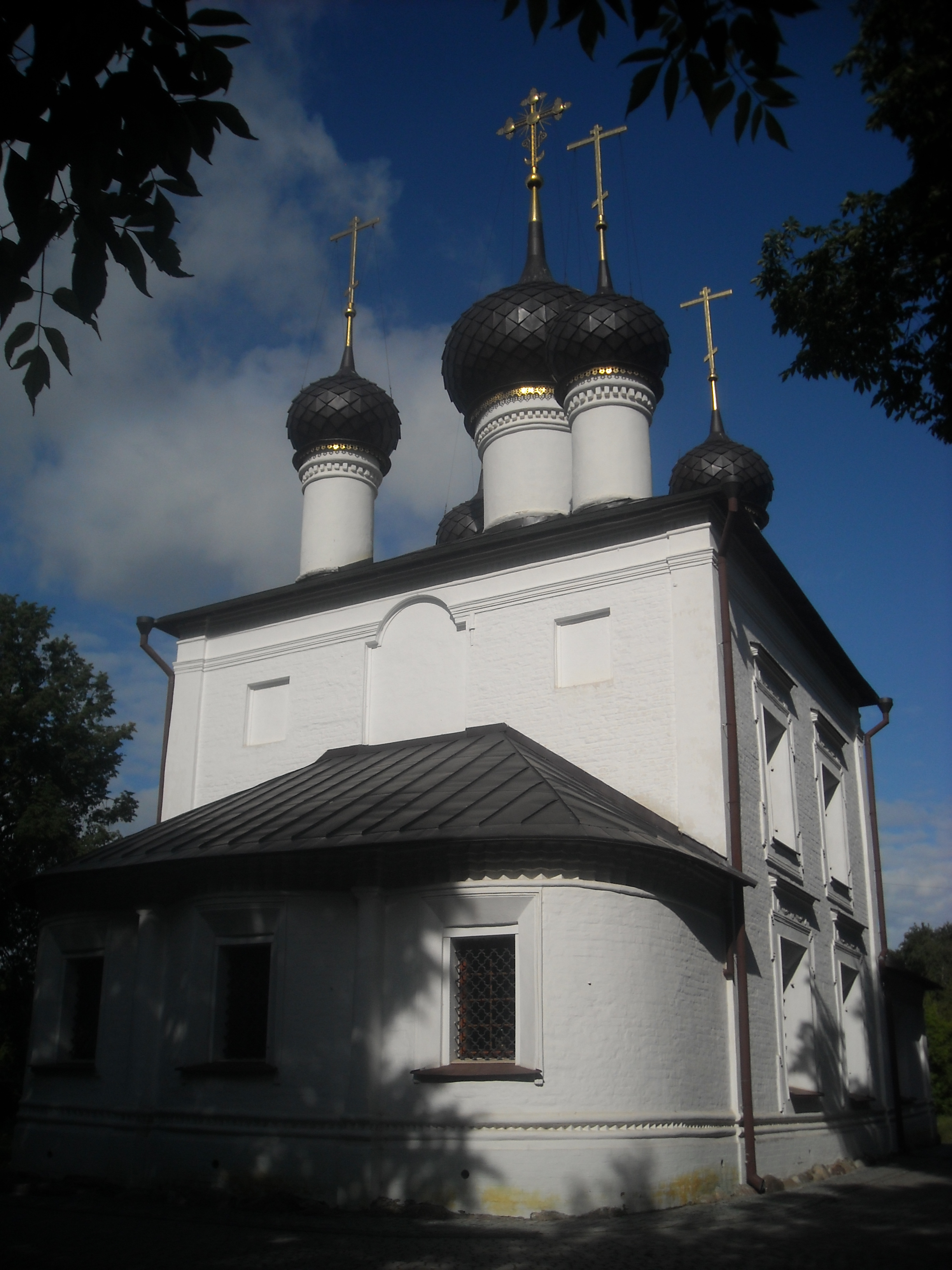 Казанская церковь: улица Большая Казанская, 1, Рыбинск, Ярославская область